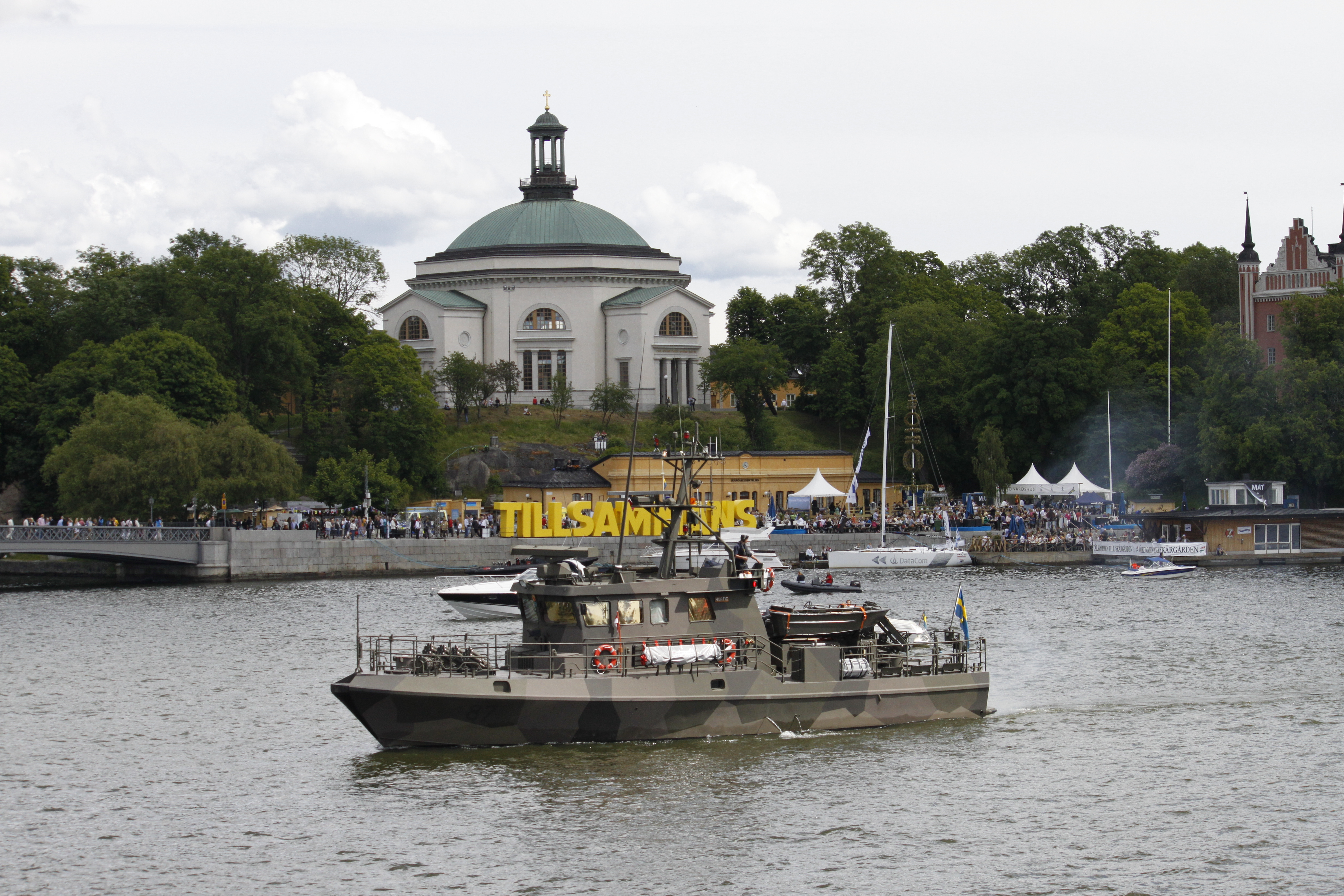 Bevakningsbåten HMS Hurtig.